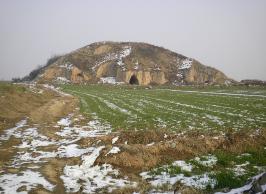 位于汉高祖刘邦的陵墓东南方